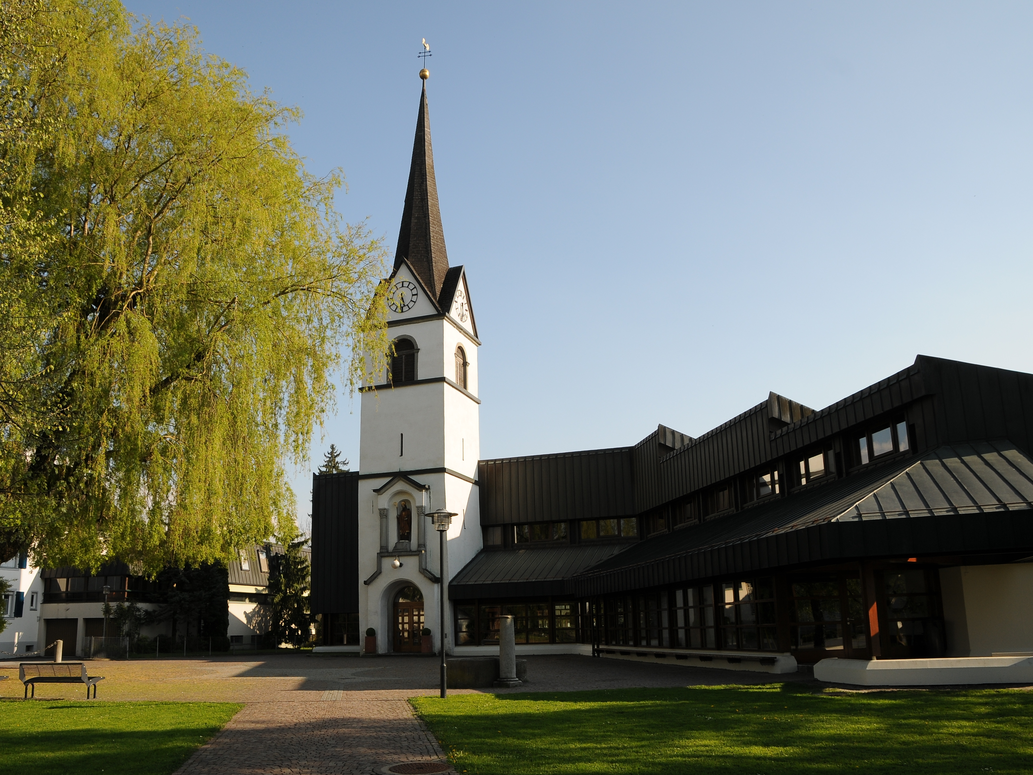 Pfarrkirche hl. Nikolaus in Hinterburg Nr.: 1 in Fußach.